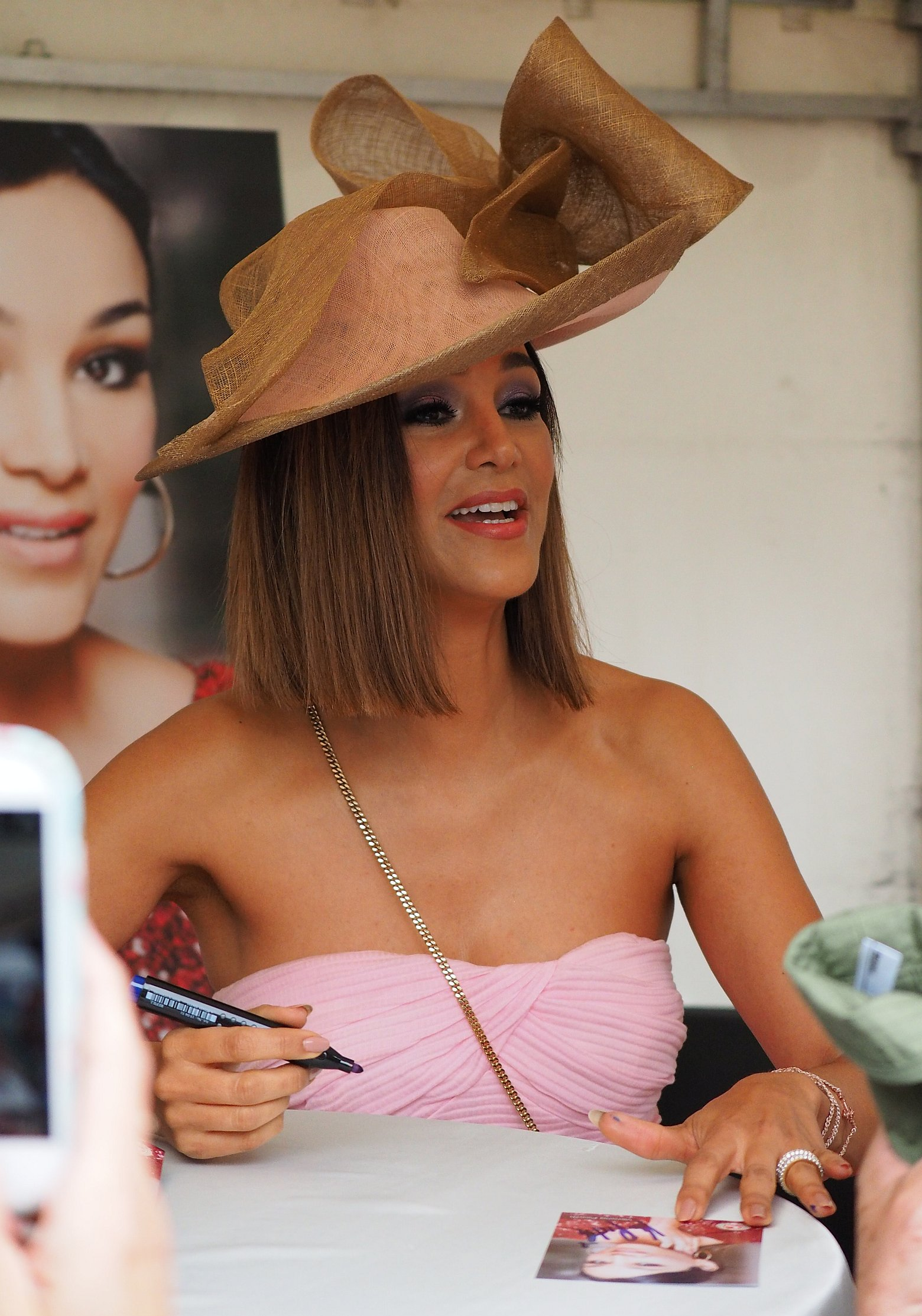 Autogrammstunde von Verona Pooth am Ascot-Renntag 2015 auf der Neuen Bult